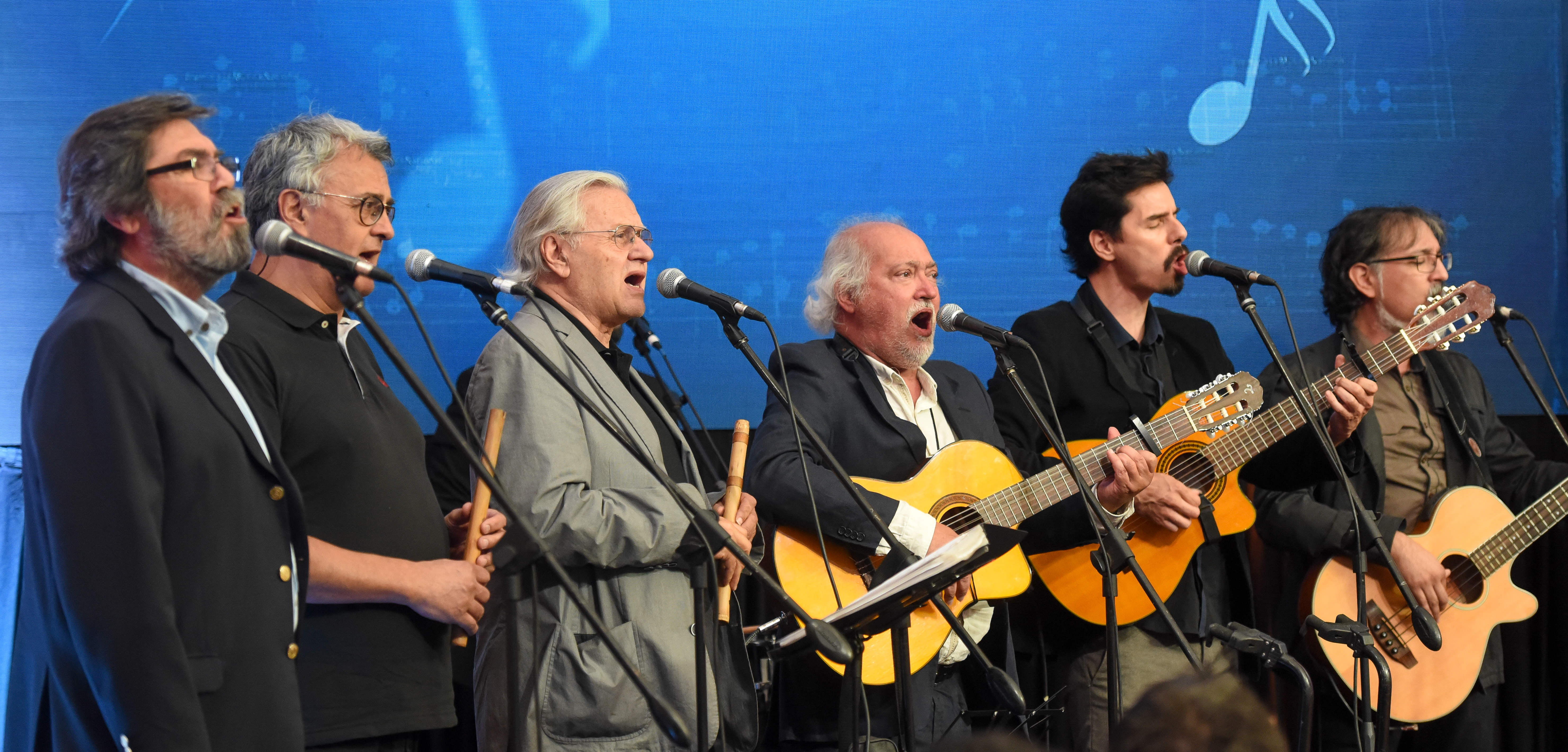 Ministra Narváez asiste a Premio a la Música Nacional 2017